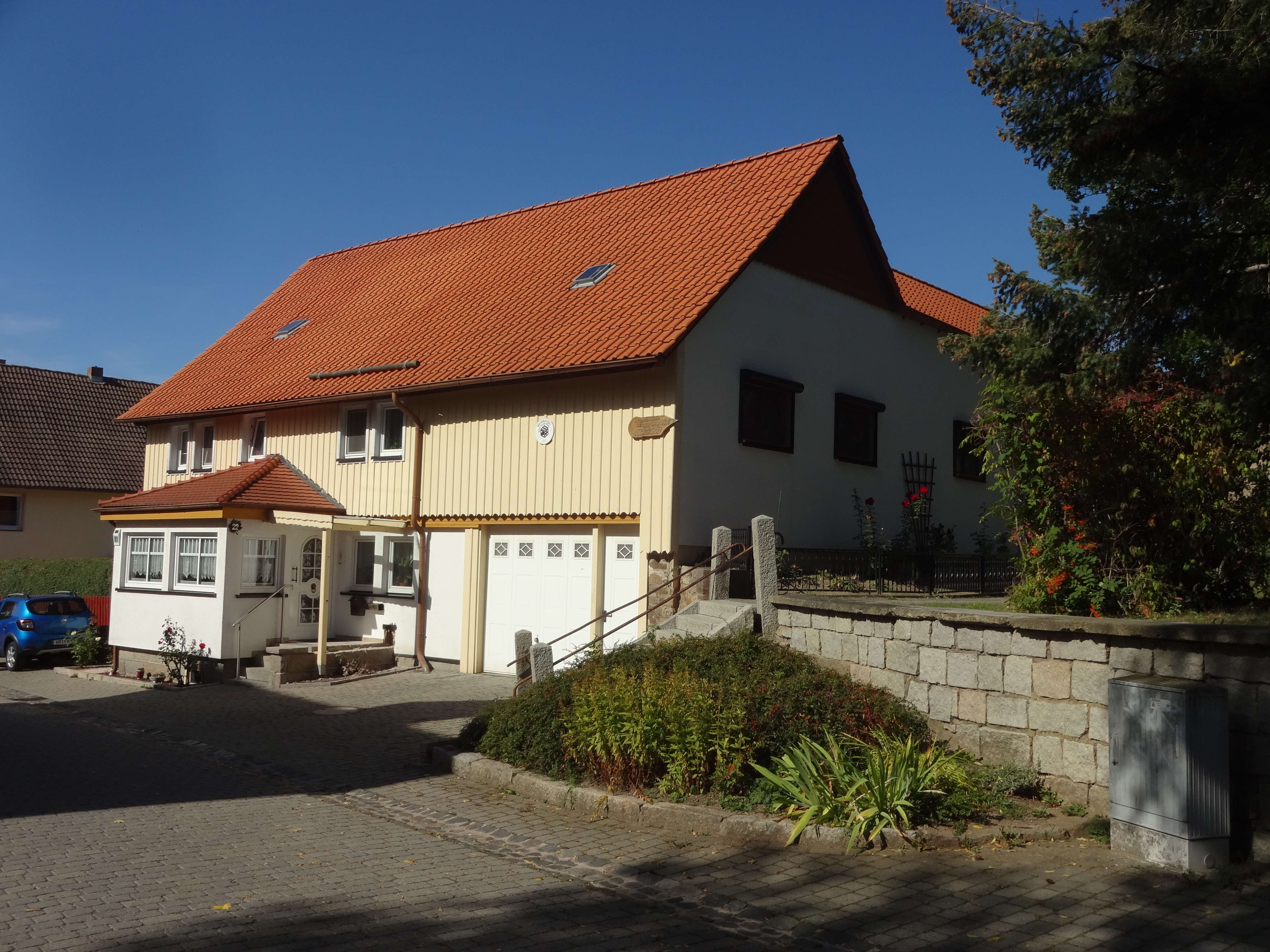 ehemals denkmalgeschütztes Wohnhaus in der Hauptstraße 22 in Drübeck